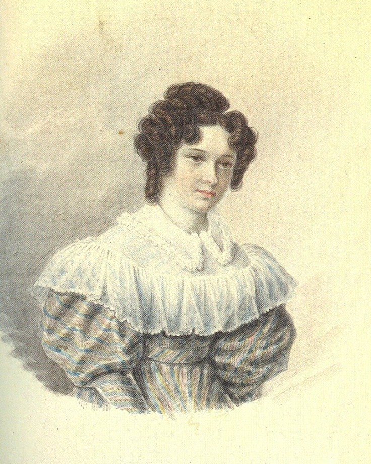 Александра Ивановна Давыдова ур.Потапова (1802-1895), жена декабриста В.Л.Давыдова